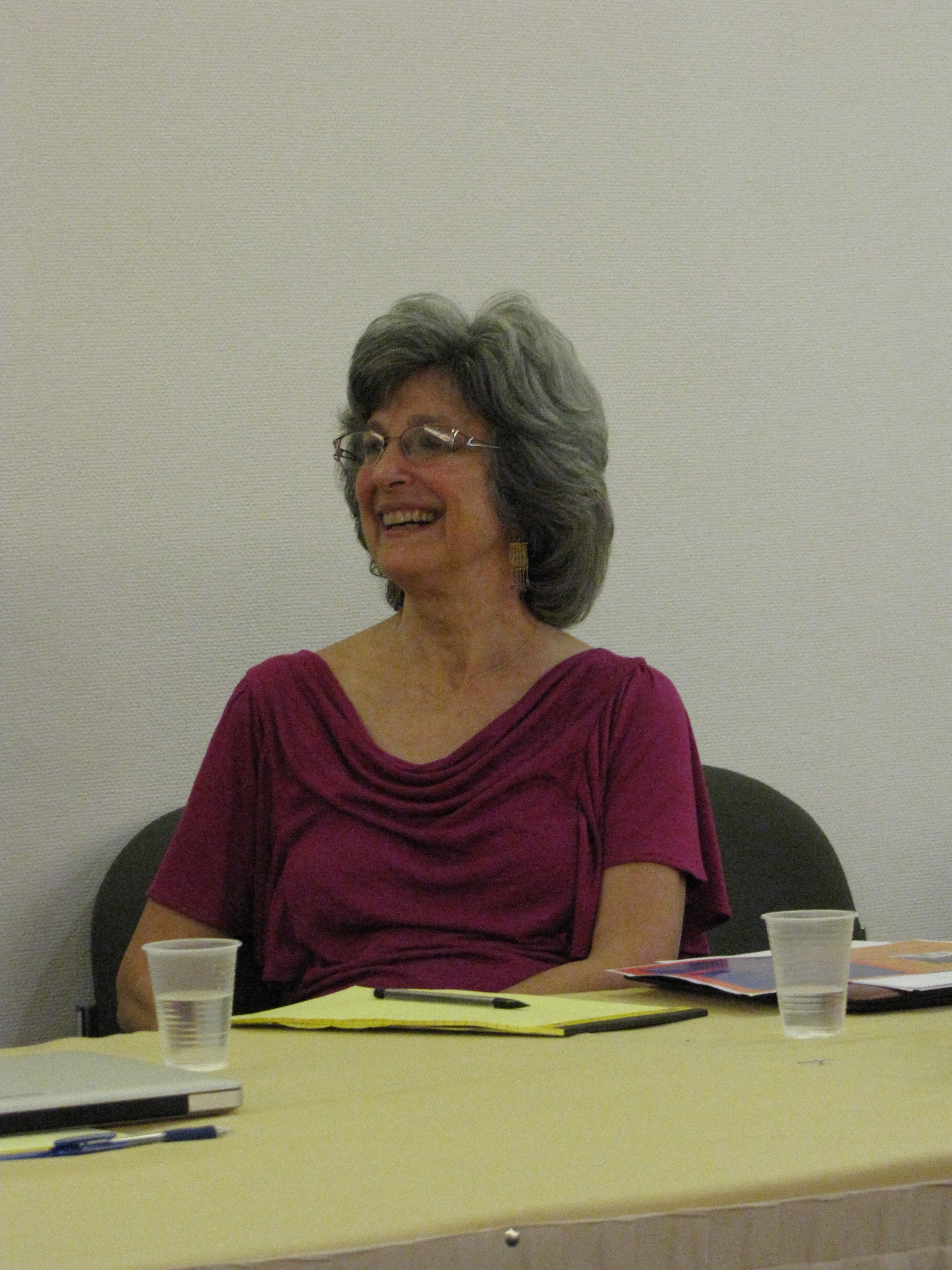 פרופסור סדרה דיקובן אזרחי